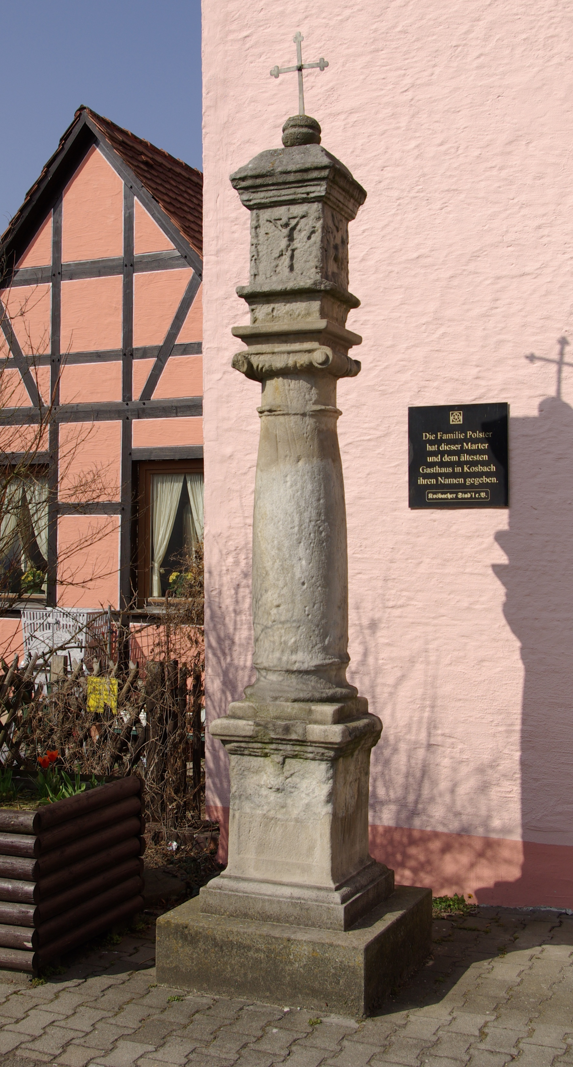 Die sogenannte Polstermarter aus dem 17. Jahrhundert im Erlanger Stadtteil Kosbach.